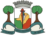 Brasao Aguas Vermelhas